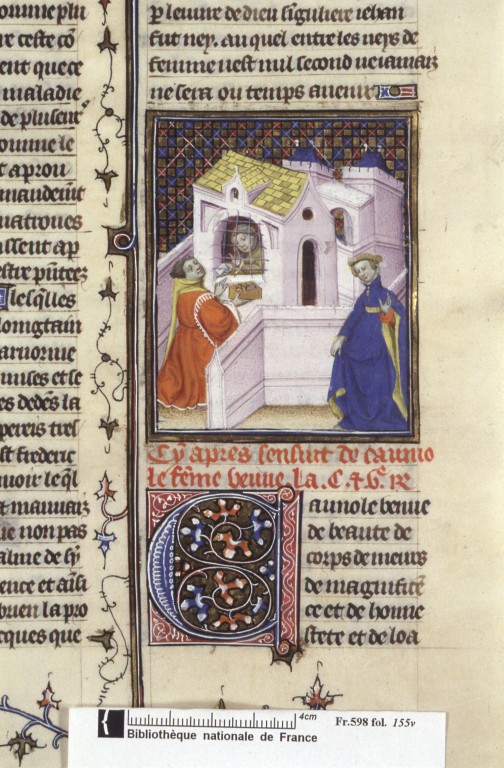 "Cammiola payant la rançon de Roland", Boccace, De mulieribus claris (traduction anonyme), France, Paris, XVe siècle